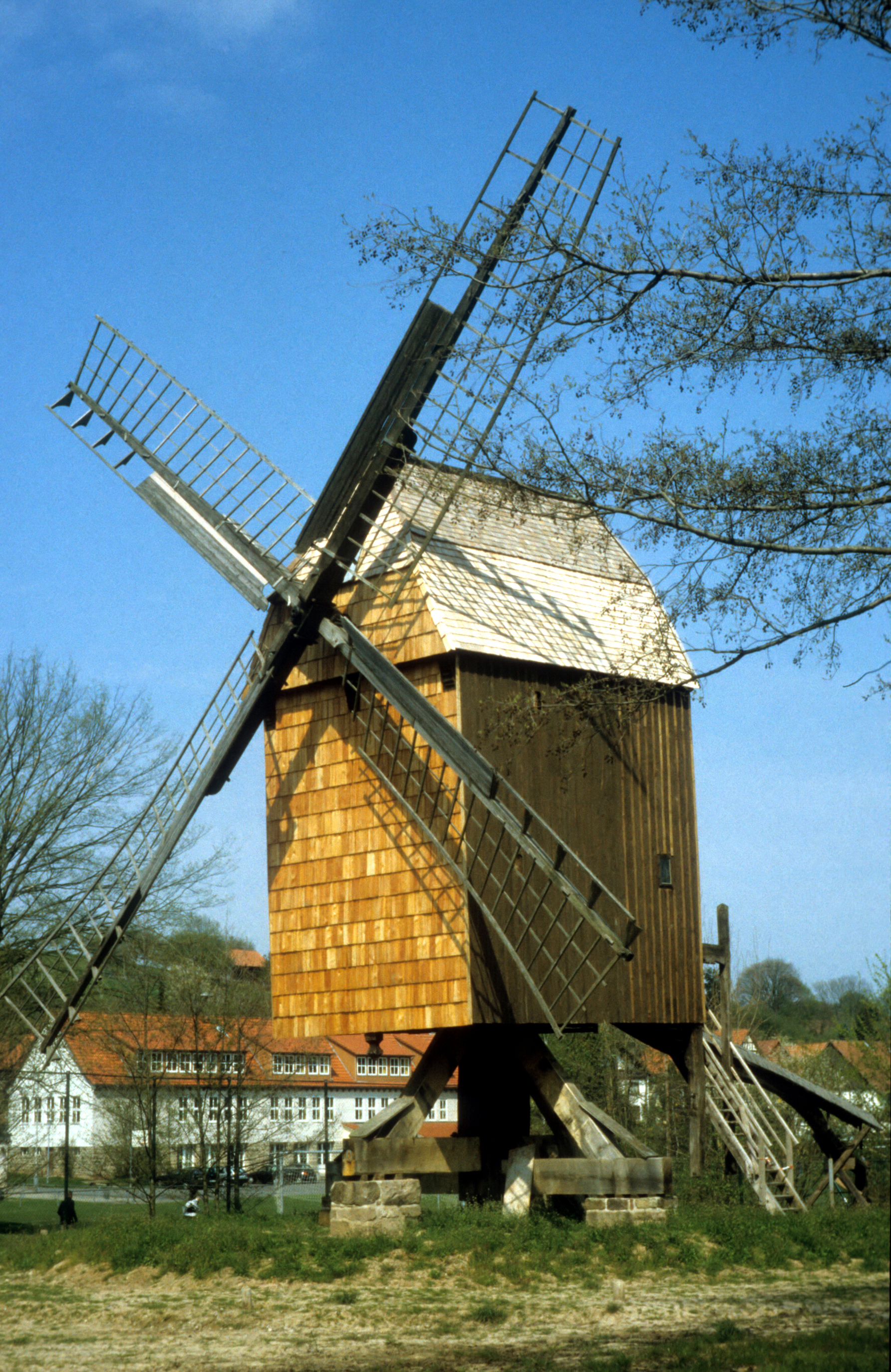 Bockwindmühle (windmill) im Brotmuseum Ebergötzen